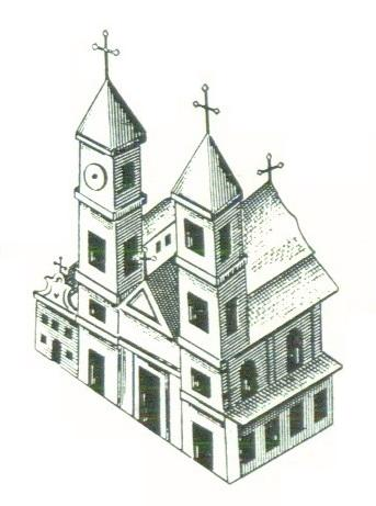 Беларуская (тарашкевіца): Магілёў (Mahiloŭ), Школішча (Školišča). Касьцёл Сьвятога Антонія Падуанскага і кляштар бэрнардынаў